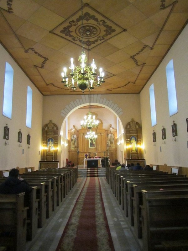 Вялікая Рагозніца. Касцёл Найсвяцейшай Дзевы Марыі